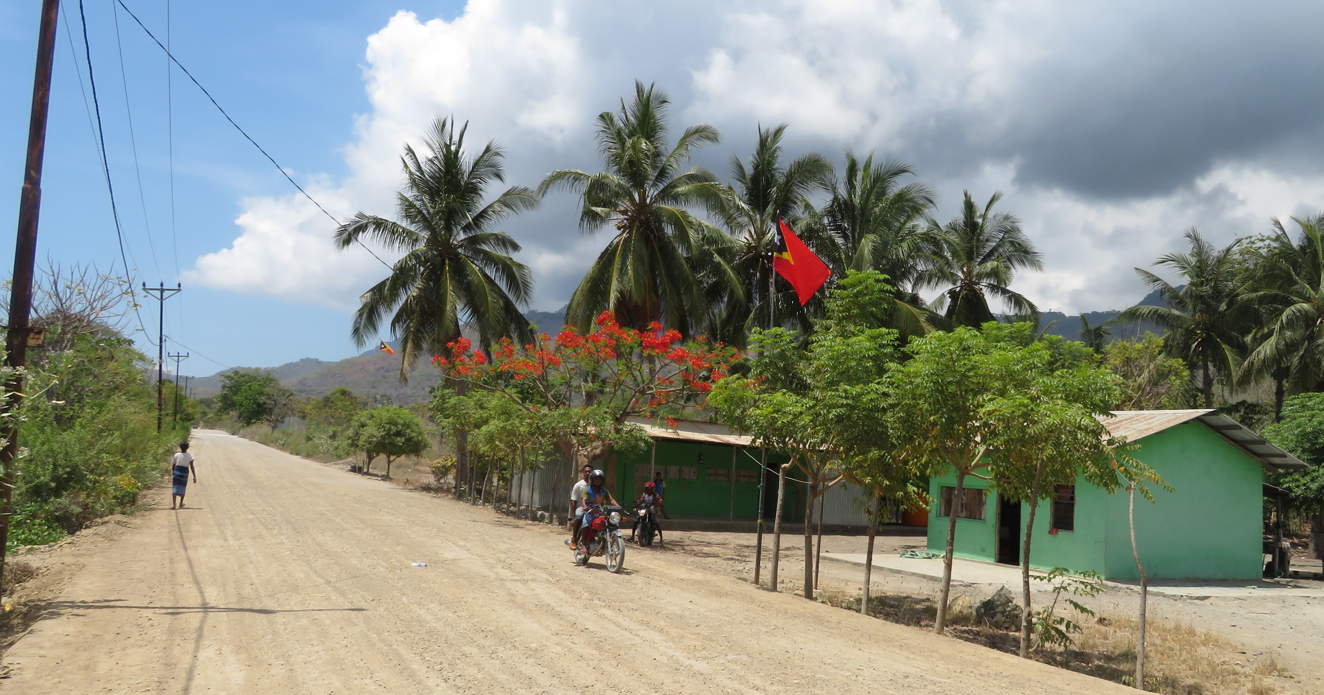 Hauptstraße in Beloi, Insel Ataúro, Timor Leste